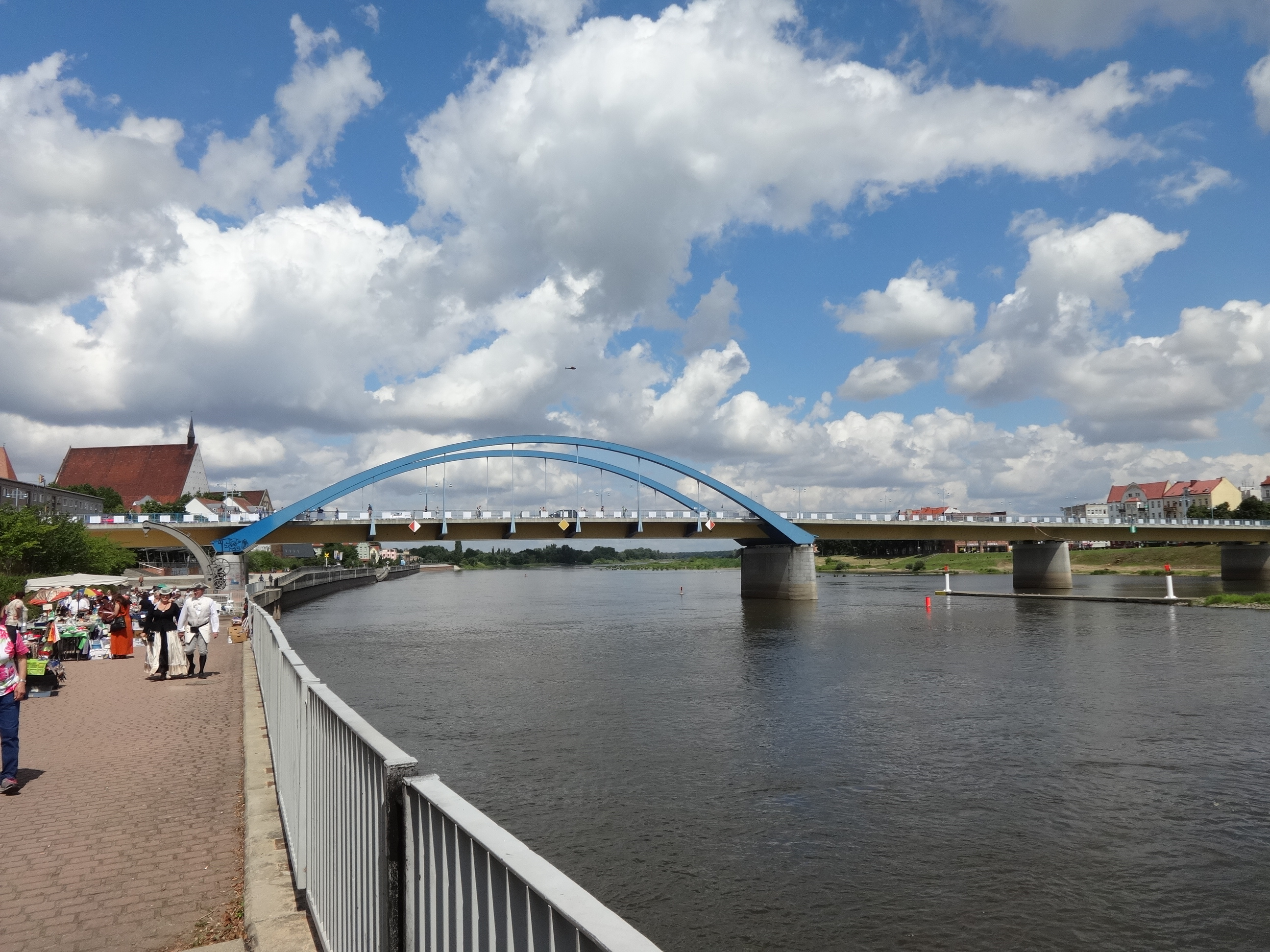 Blick von der Uferpromenade in Frankfurt (Oder) auf die Stadtbrücke nach Slubice